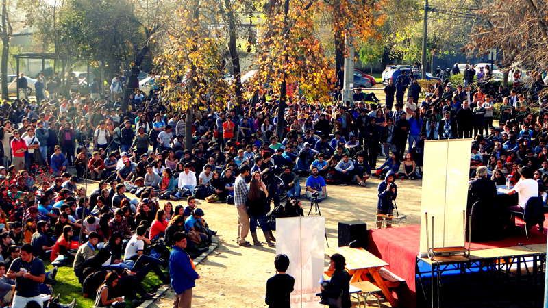 El 05 de junio de 2013, se realizó un foro presidencial con Marcel Claude, organizado por el Centro de Estudiantes de Ingeniería Comercial en el Frontis de la Facultad de Administración y Economía de la Universidad de Santiago. La cantidad de asistentes no tiene precedentes.